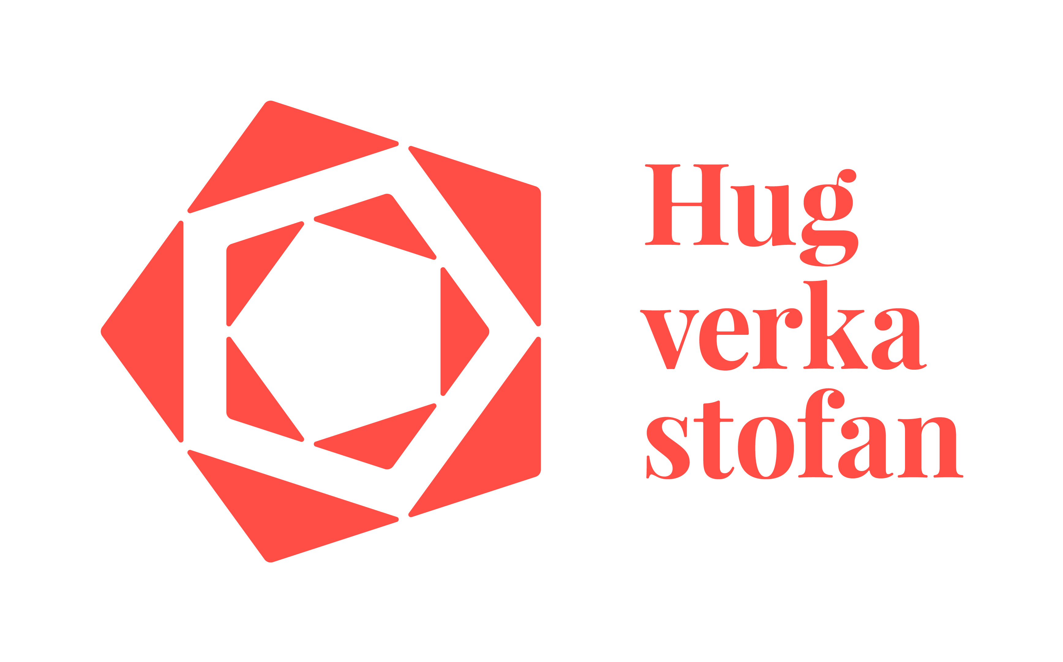 Merki Hugverkstofunnar